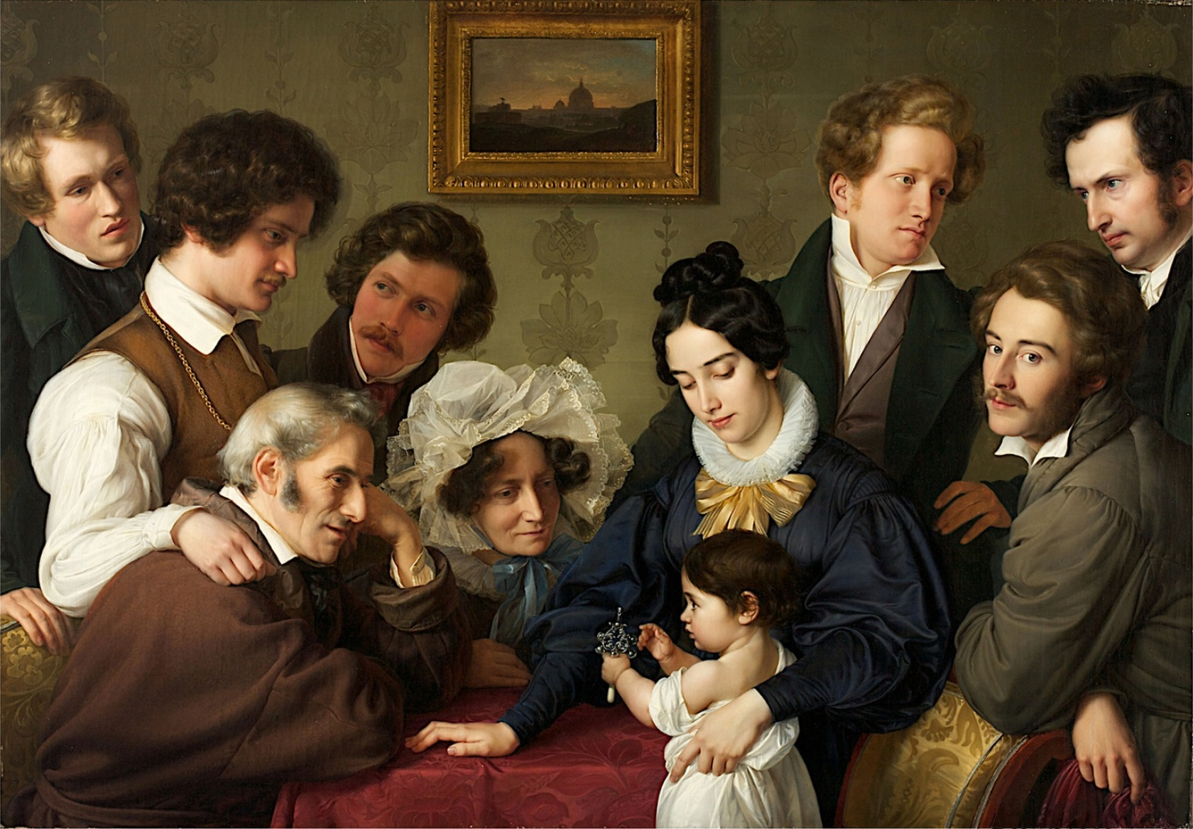 Kollektivarbeit von Eduard Bendemann (Zweiter oben links), Theodor Hildebrandt (Dritter oben links), Julius Hübner (unten rechts) mit seine Frau Pauline Hübner, geborene Bendemann mit ihrer Tochter Emma und ihren Eltern Anton Heinrich Bendemann und dessen Ehefrau Fanny Eleonore (im Zentrum des Gemäldes), Friedrich Wilhelm von Schadow (rechts oben), und Karl Ferdinand Sohn (Erster oben links). Der Schadow-Kreis (Die Familie Bendemann und ihre Freunde), (1830-31)